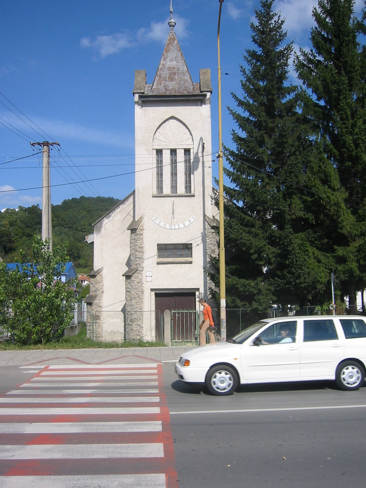 Vranov nad Topľou, Slovakia